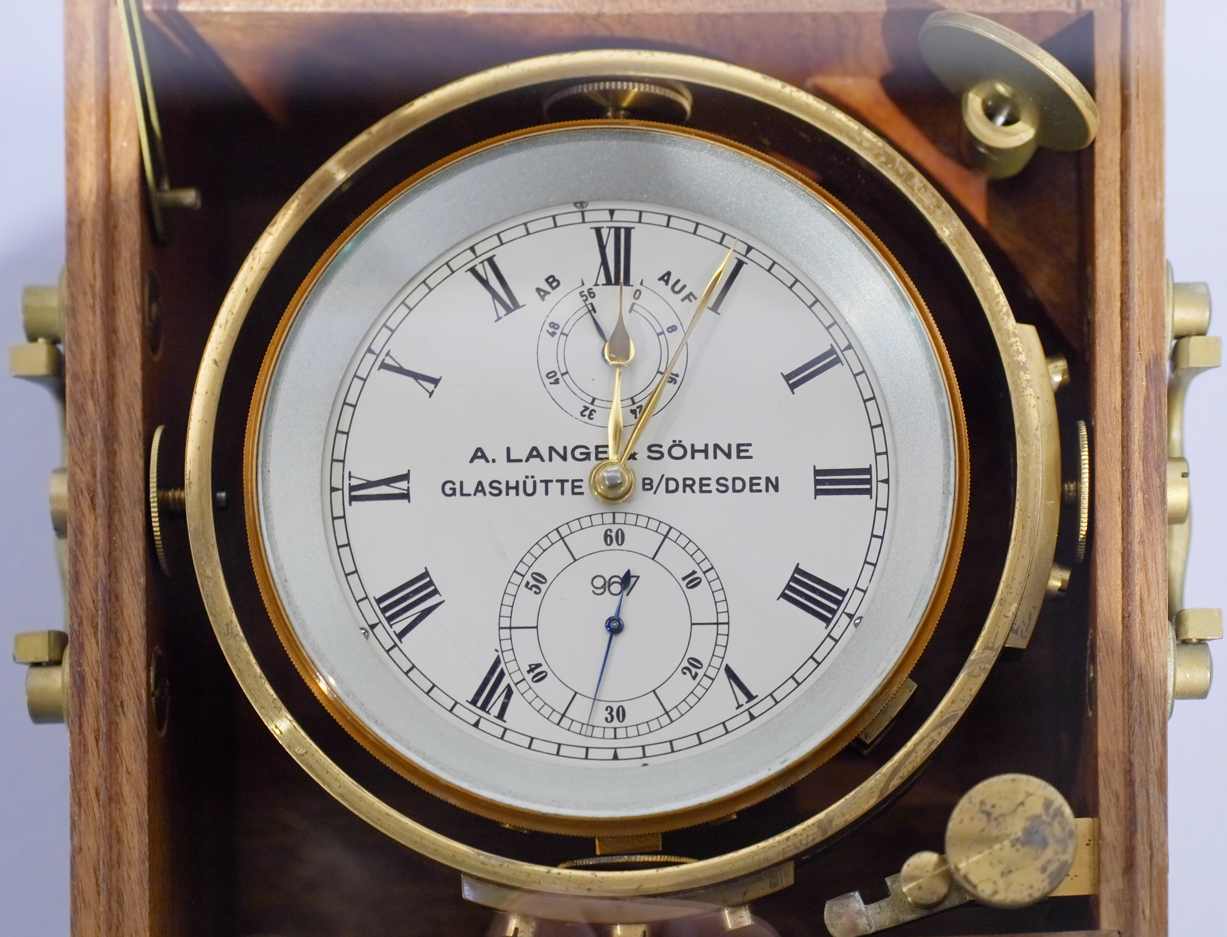 Marine-Chronometer der Firma A. Lange & Soehne Glashütte (1948), GeoForschungsZentrum, Potsdam, Exponat der Ausstellung 2017 vom GeoForschungsZentrum Potsdam